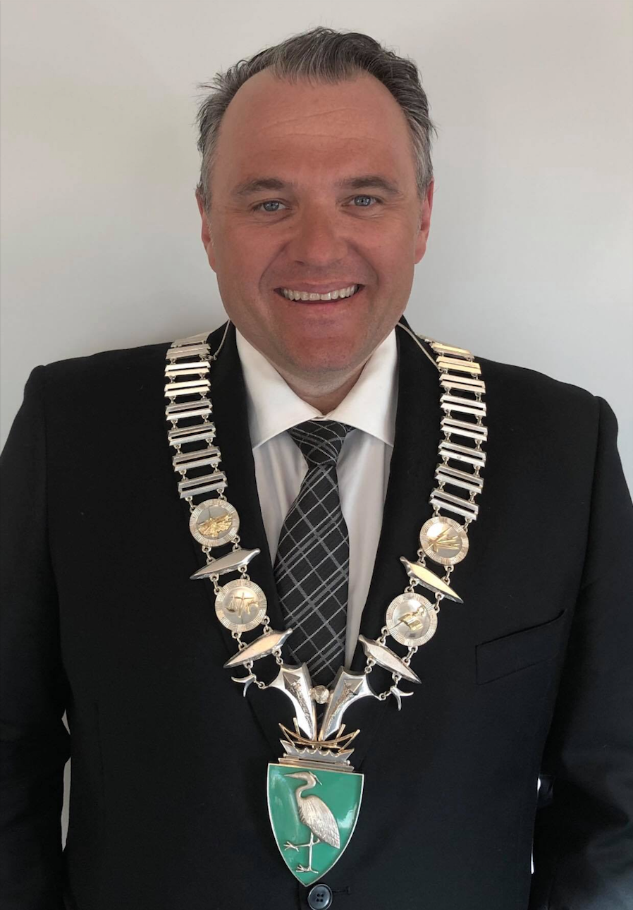 Ordfører i Forsand 2015-2019